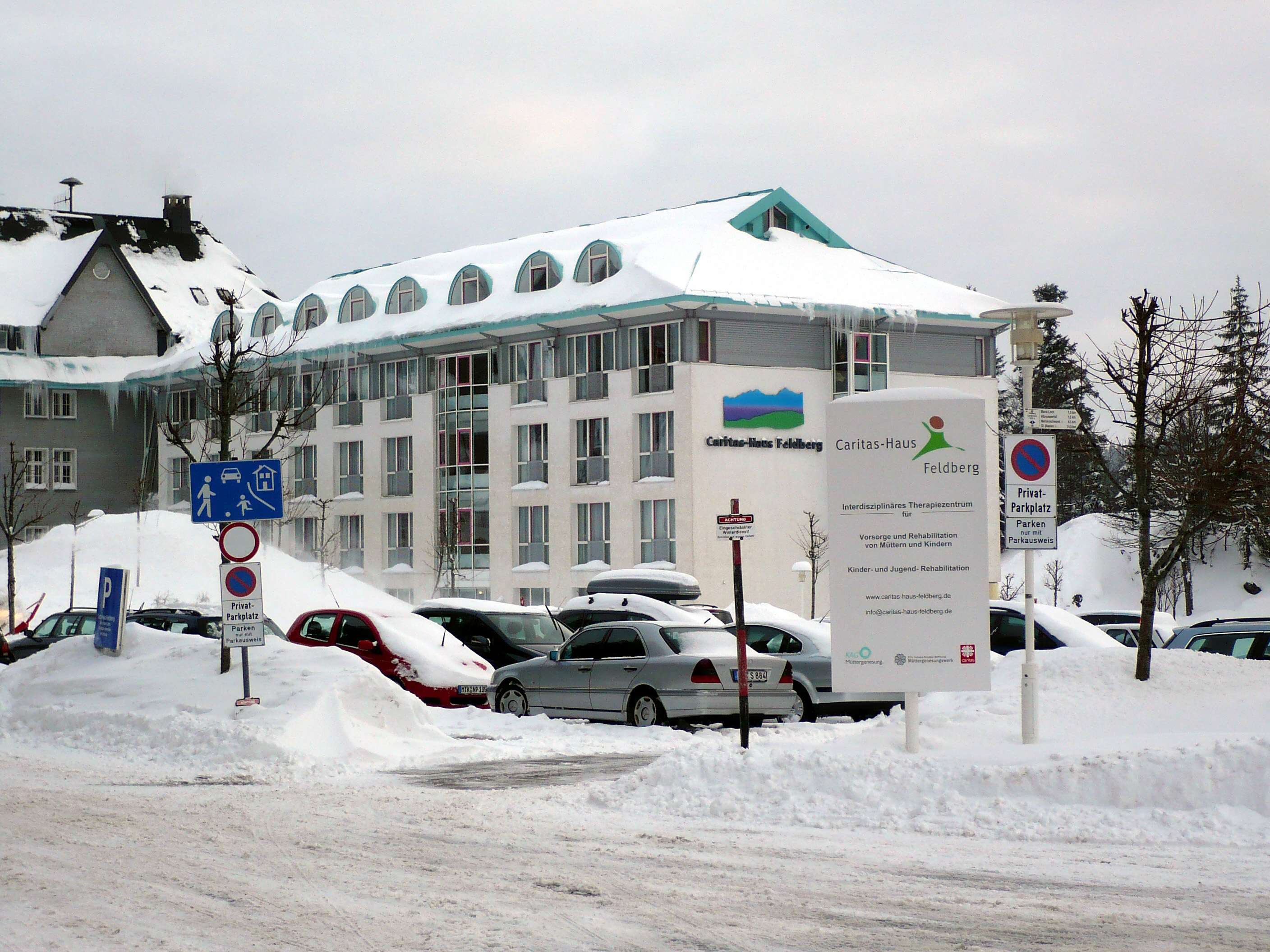 Caritashaus Feldberg